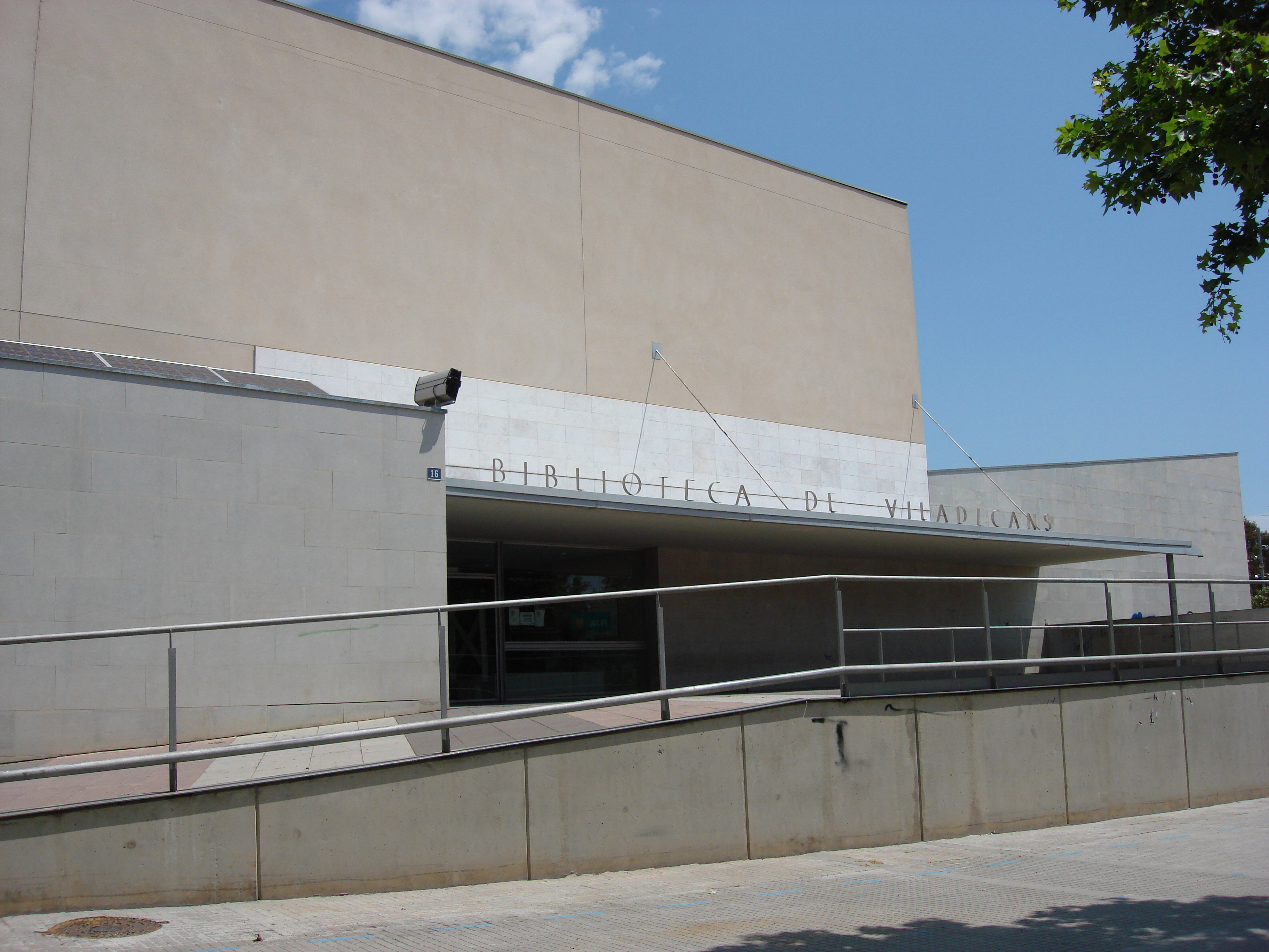 Biblioteca pública de la Diputació de Barcelona a Viladecans.